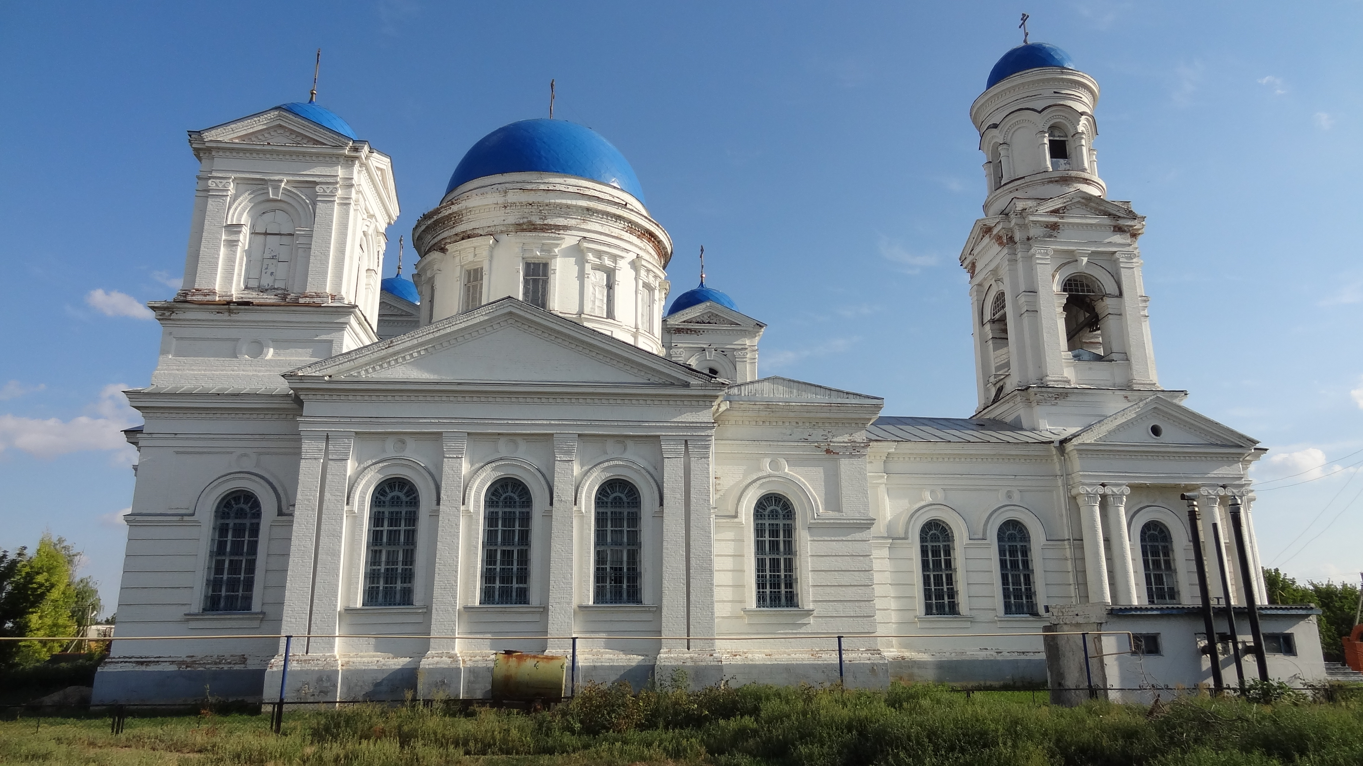 Первоначально деревянная церковь была построена в 1839 г. на средства прихожан. В 1909 году была выстроена новая каменная церковь с такой же колокольней. Саратовская область, р.п. Дергачи, ул. Пугачева, д. 87